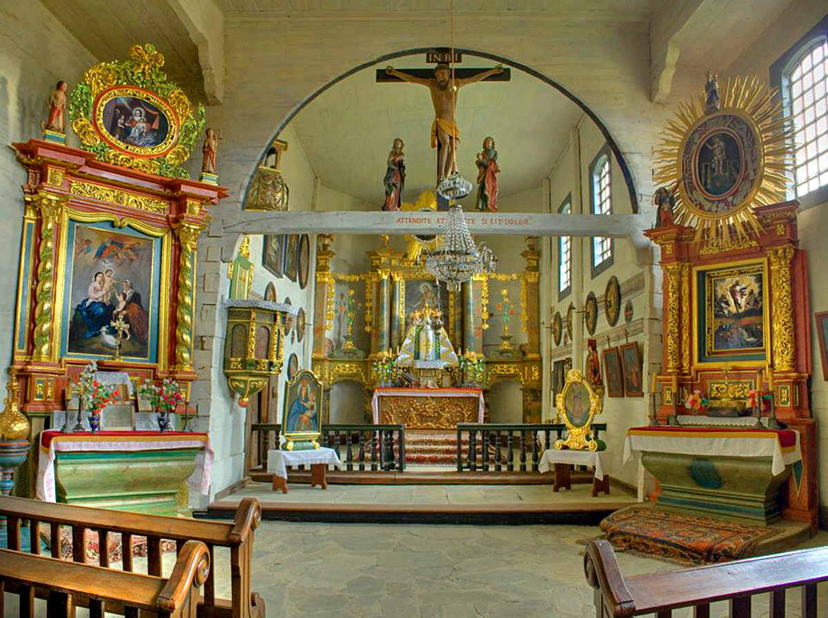 Wnętrze drewnianego kościoła pw. św. Mikołaja z Bączala Dolnego, obecnie w MBL w Sanoku